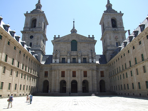 El Patio de los Reyes